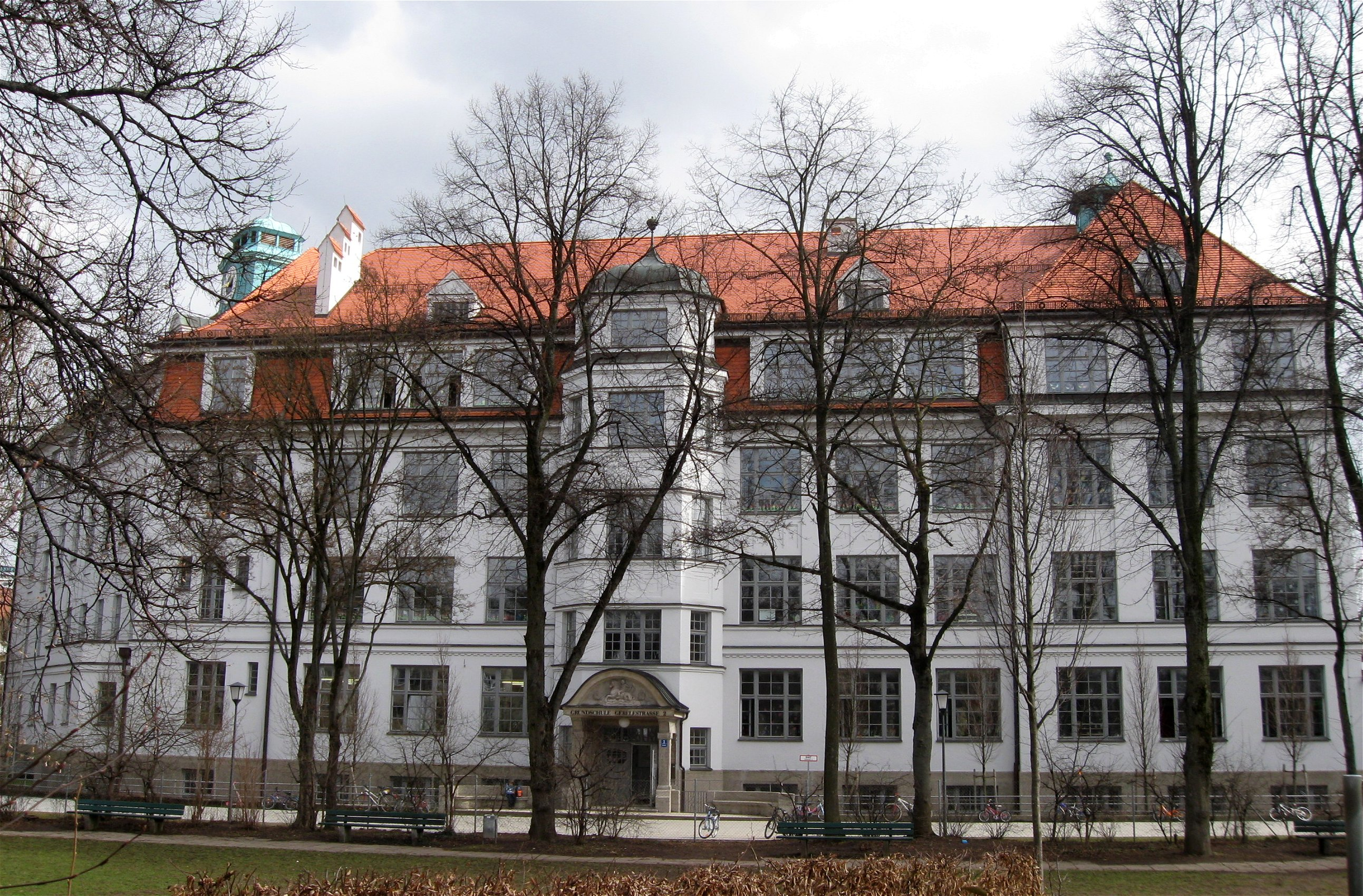 Gebelestraße 2; Volksschule, barockisierend, mit Dachreiter, 1913-14 von Wilhelm Bertsch